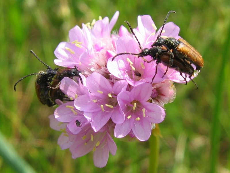 Bockkäfer Pseudovadonia livida auf Sand-Strand-Grasnelke Armeria maritima subsp. elongata, Zingst